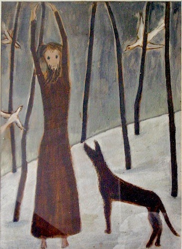 Pintura al óleo.